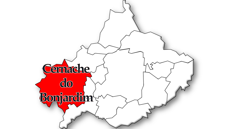 População